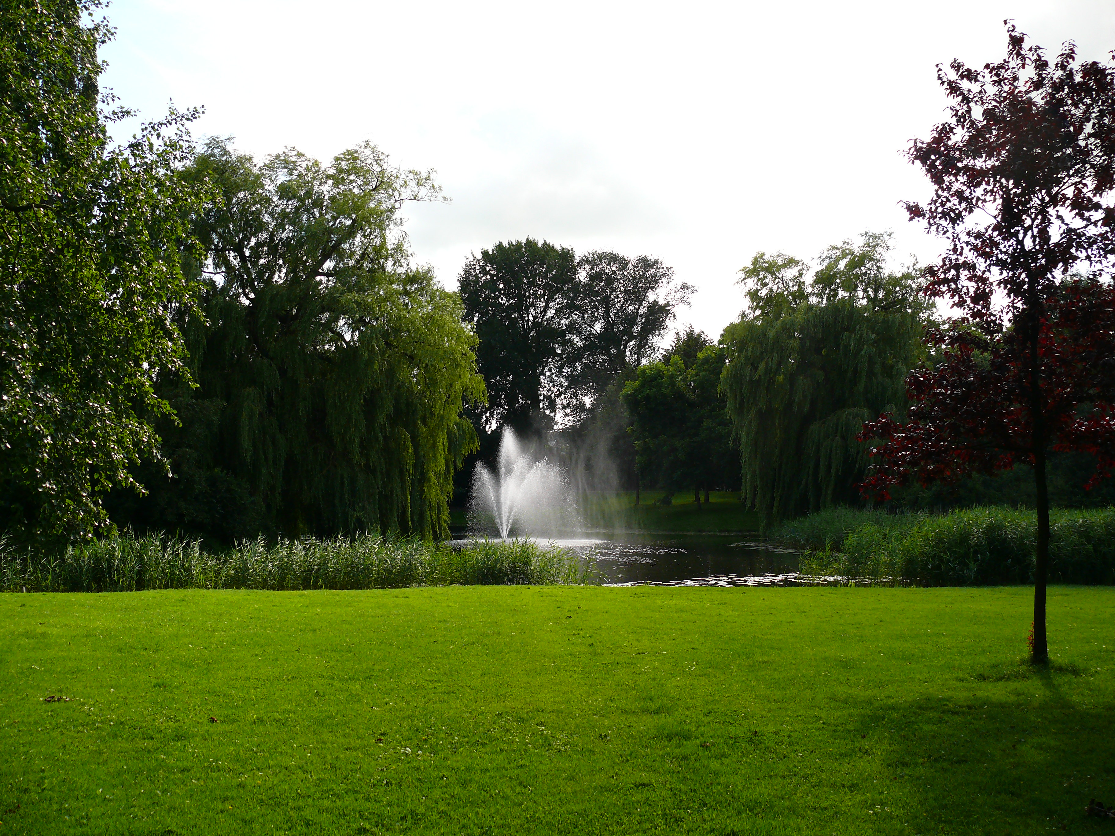 Foto van het Westerpark (Vossepark) in Leeuwarden